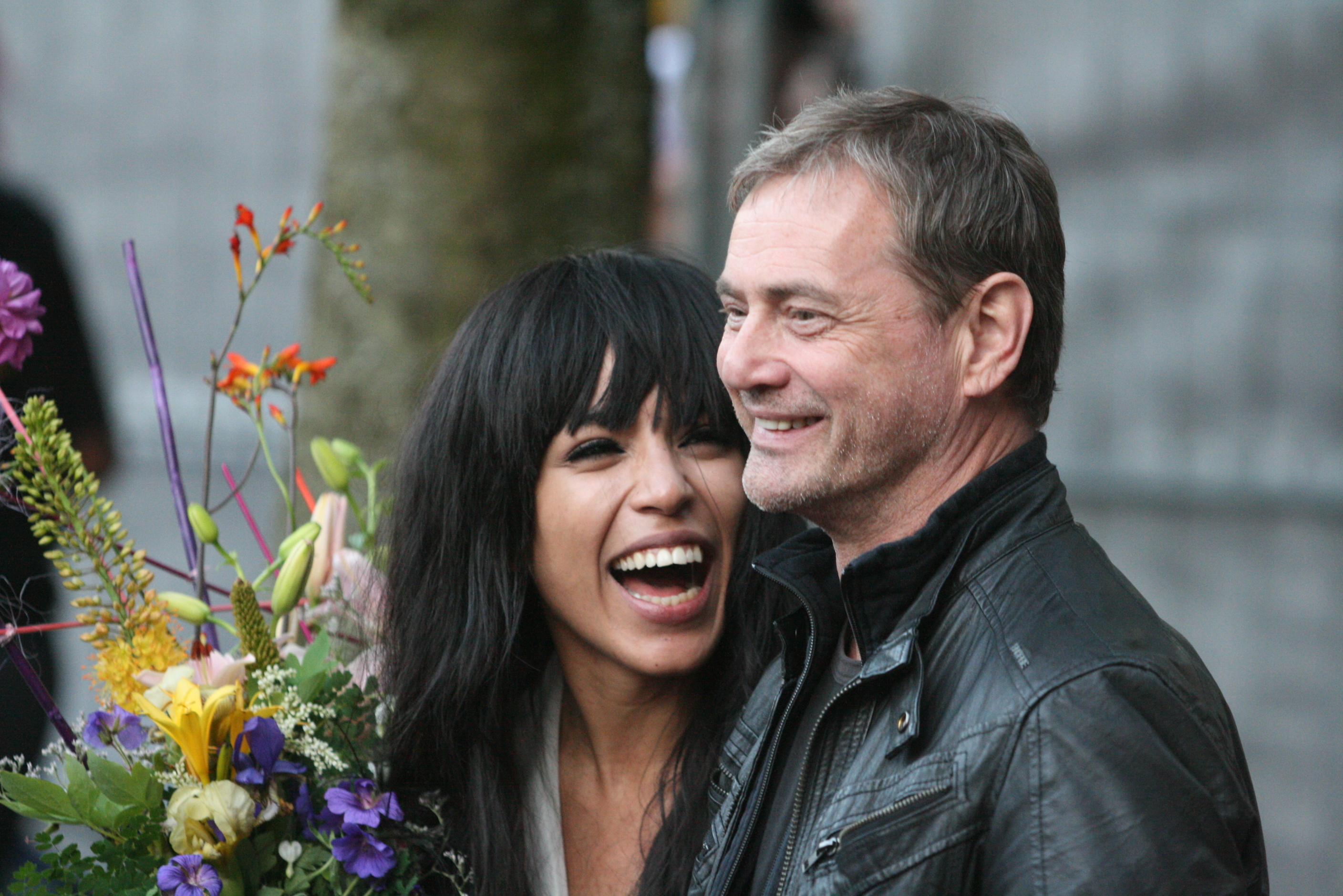 Loreen and Christer Björkman at Sommartorsdagarna, June 2012 in Borås, Sweden.